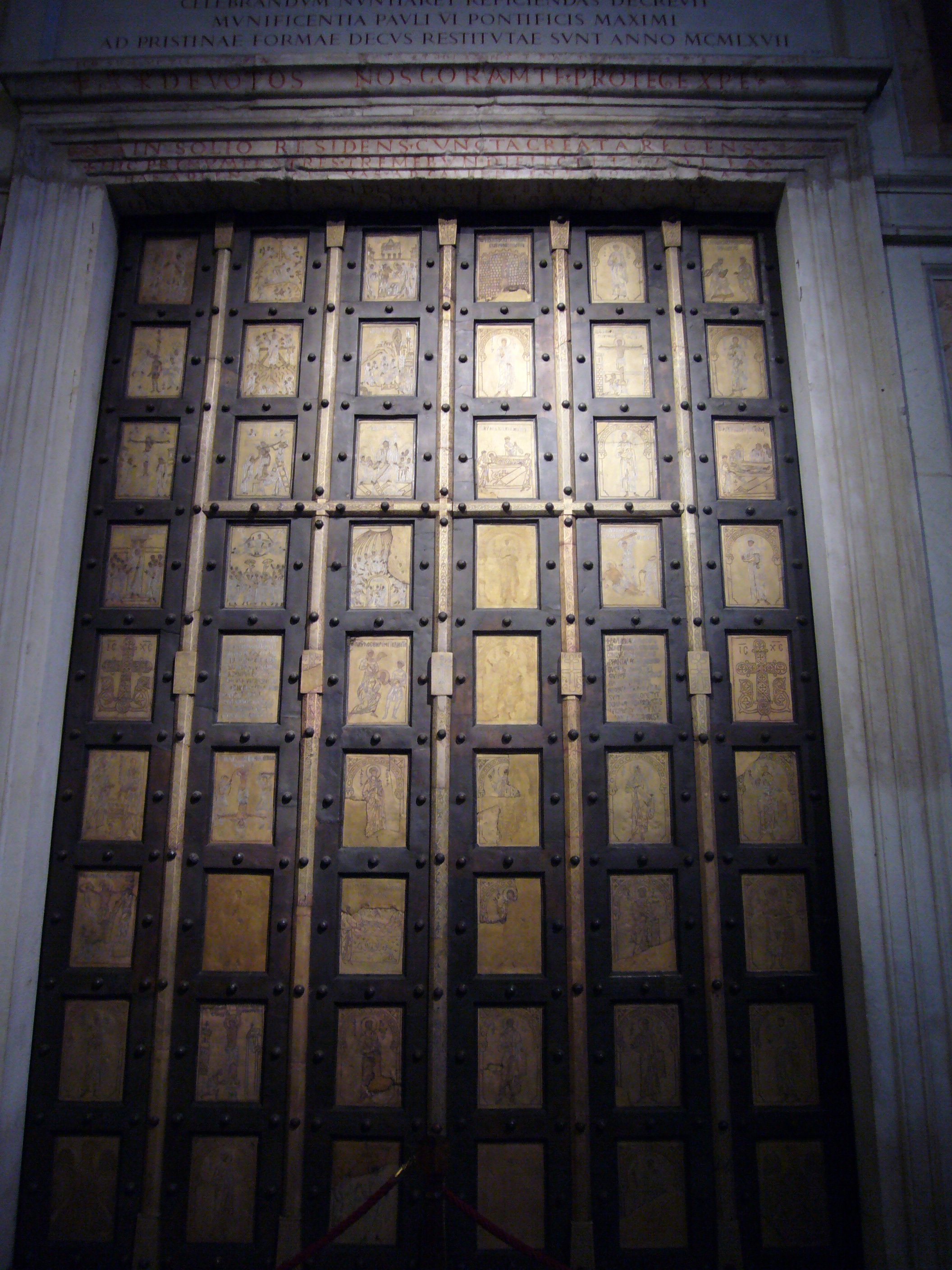 Roma, San Paolo fuori le mura: porta bizantina (antica porta principale, 1070)